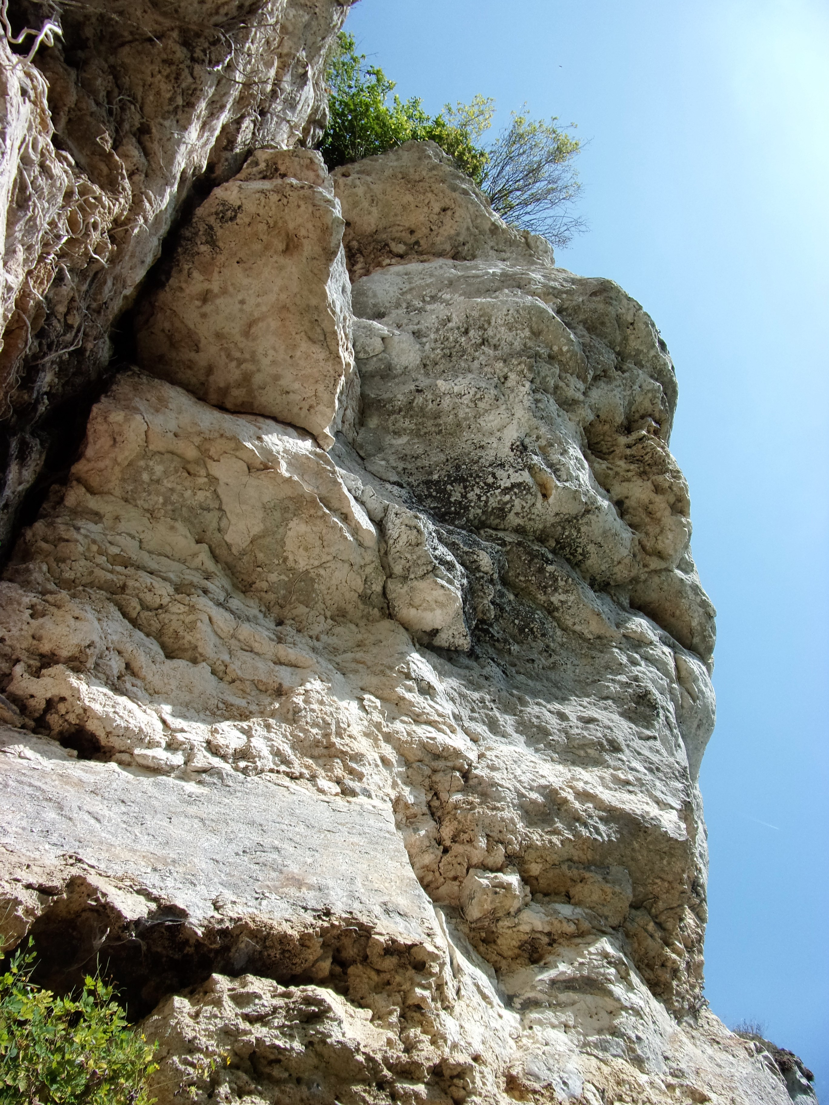 Les rochers de Courçay en contre-plongée